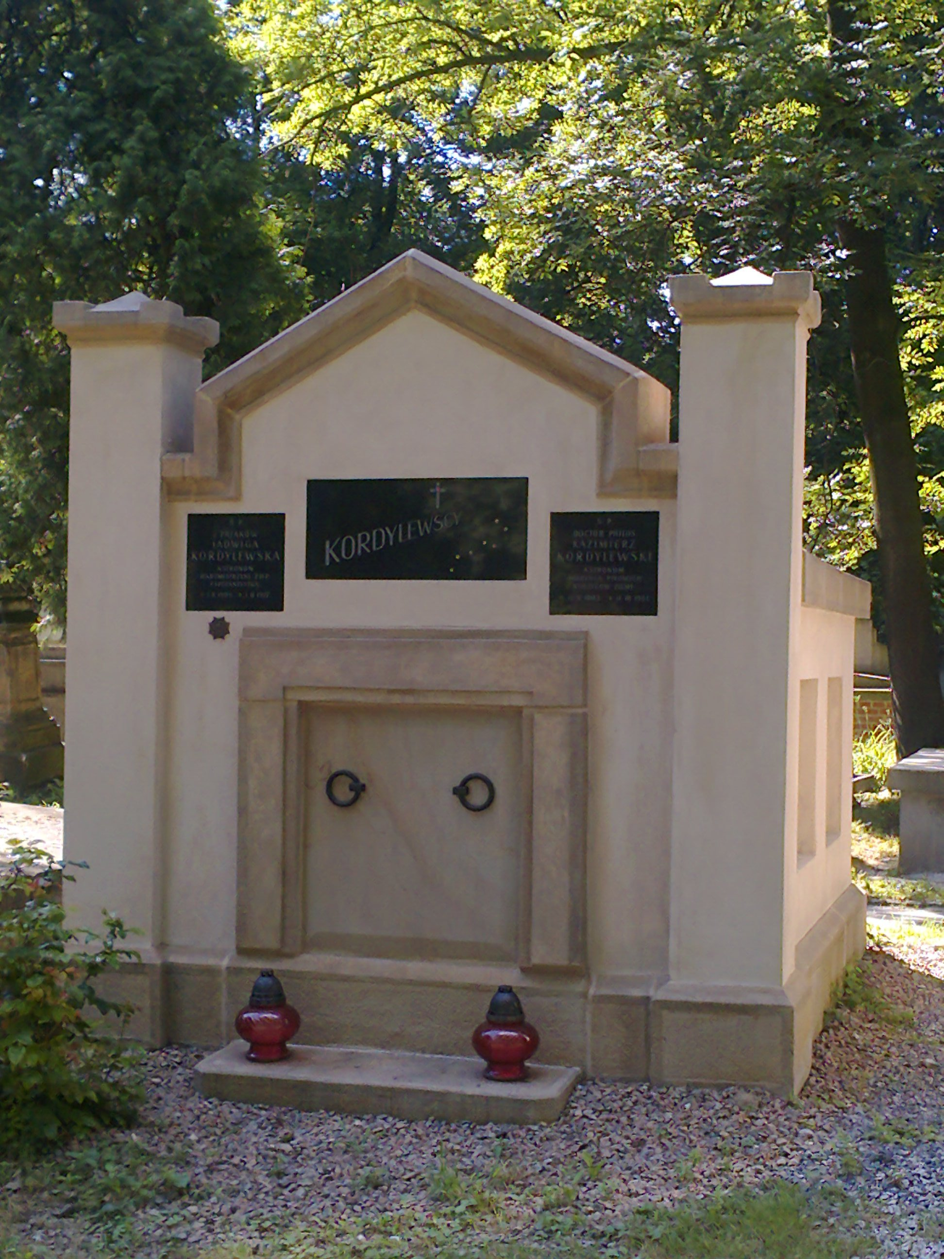 Grobowiec rodziny Kordylewskich na Cmentarzu Rakowickim w Krakowie.